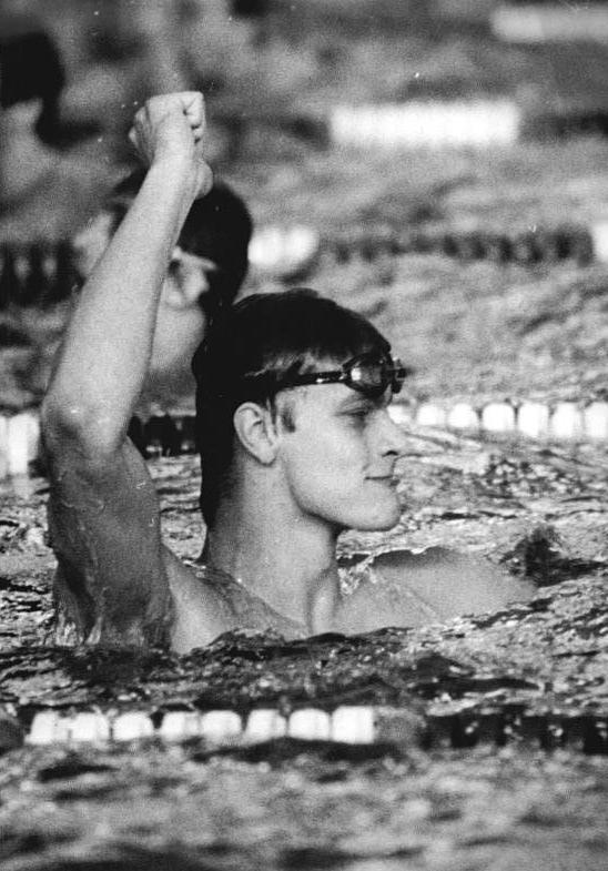 Jörg Woithe ADN-ZB Lehmann 28-7-82 Erfurt: Vorschaumotiv für die 4. Weltmeisterschaften im Sportschwimmen vom 1. bis 7. August 1982 in Guayaquil-Ekquador. Die sechsköpfige DDR-Mannschaft der Herren wird vom 19jährigen Freistil-Olympiasieger und Europarekordhalter Jörg Woithe (SC Dynamo Berlin- Foto von der DDR-Meisterschaft 1982 in Erfurt) angeführt.